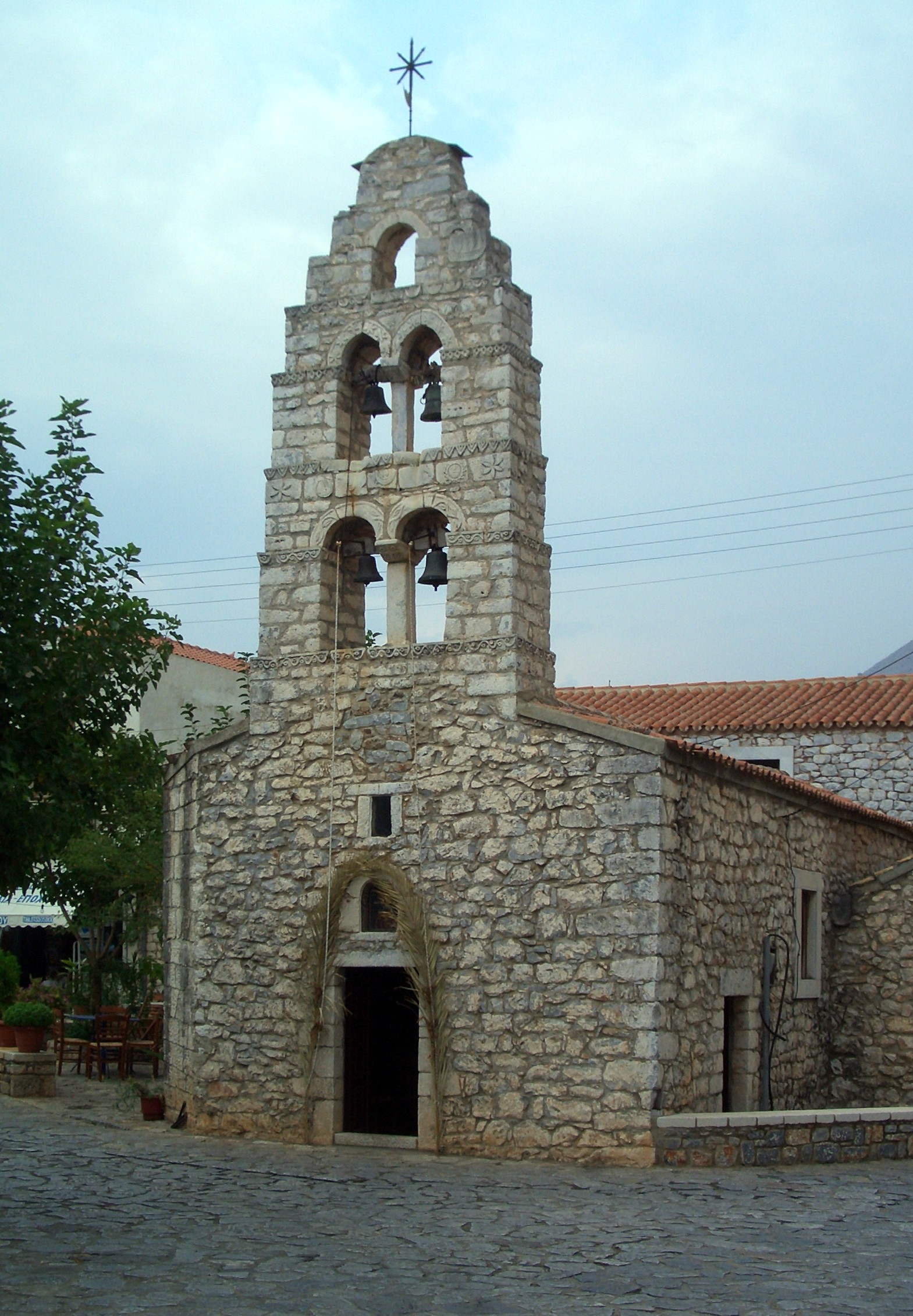 Църквата Свети Архангели в Ареополи, Гърция.